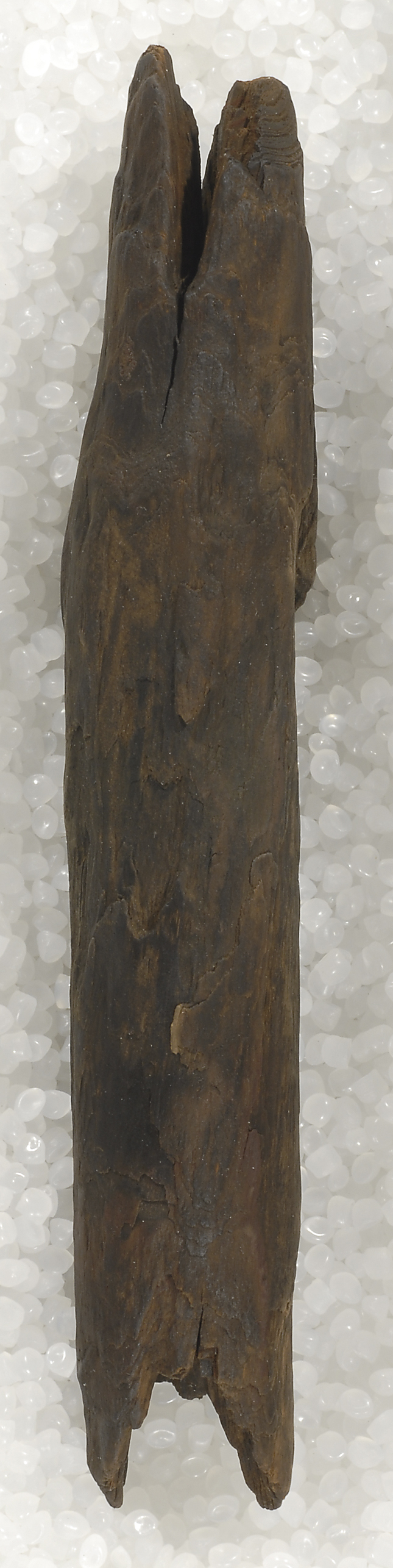 Klemmschaft I aus Schöningen